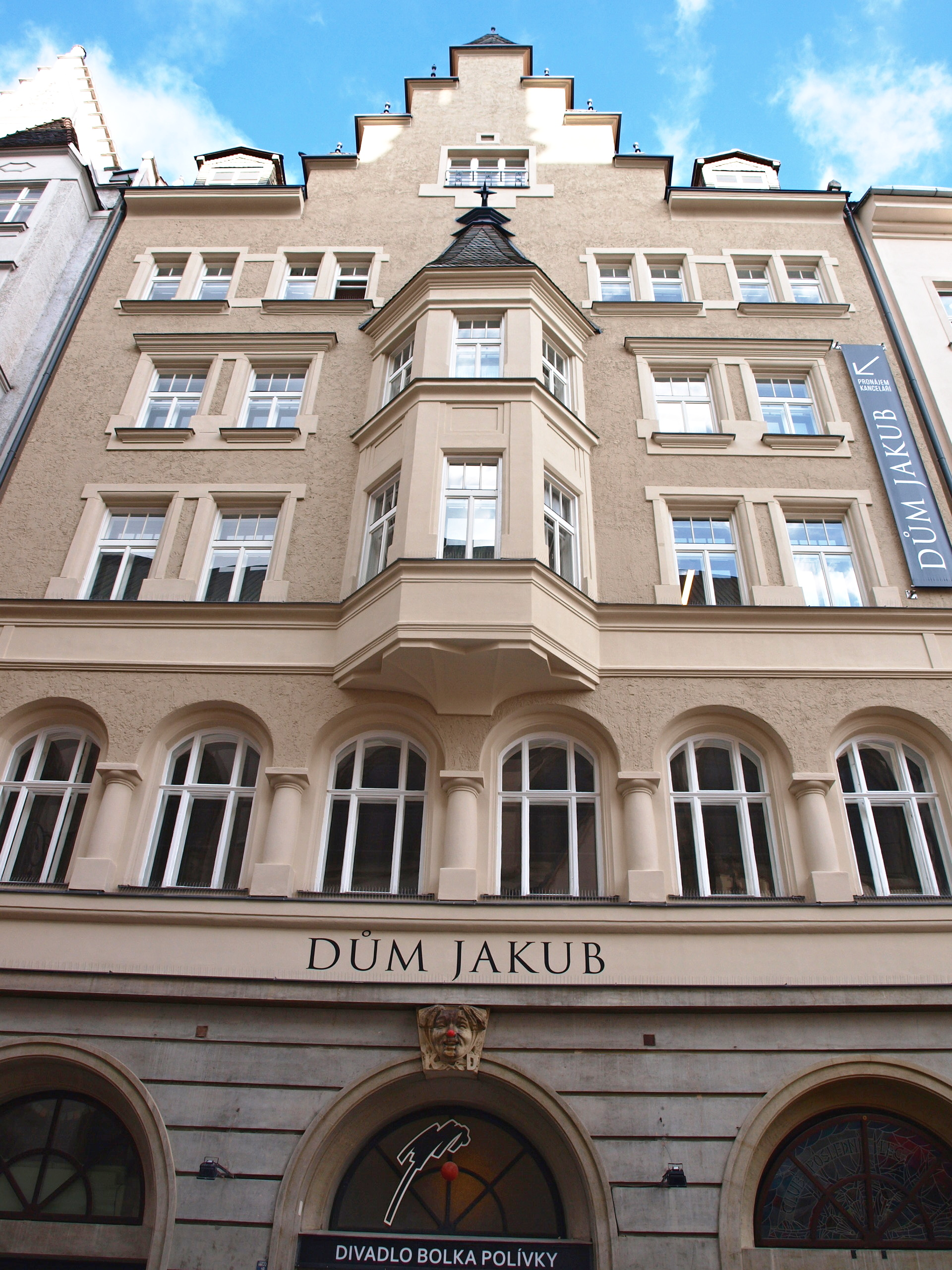 Jakubské náměstí, Divadlo Bolka Polívky